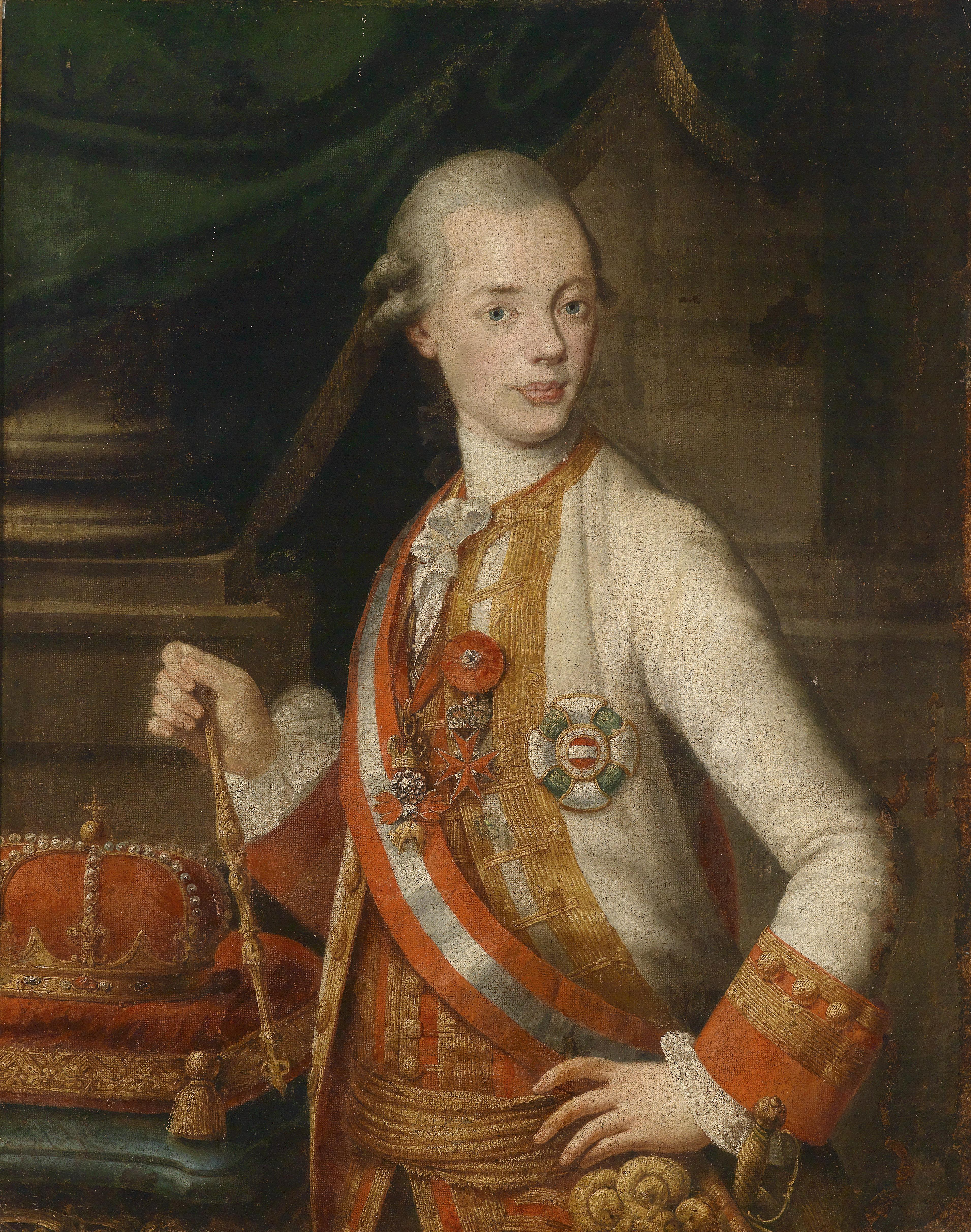 Bildnis des späteren Kaisers Leopold II. als Großherzog von Toskana (reg. seit 1765)